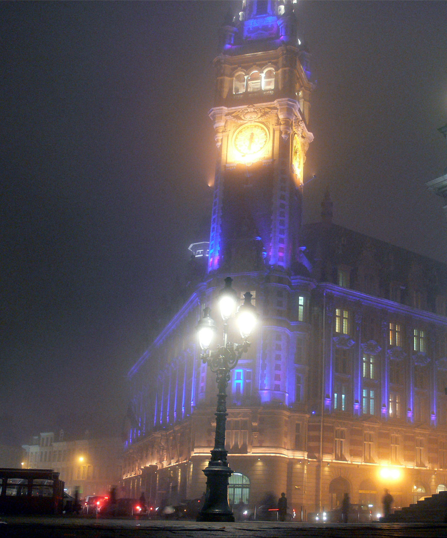 Beffroi de la chambre régionale de commerce et d'industrie, de nuit, en 2006 (à Lille, Nord de la France).